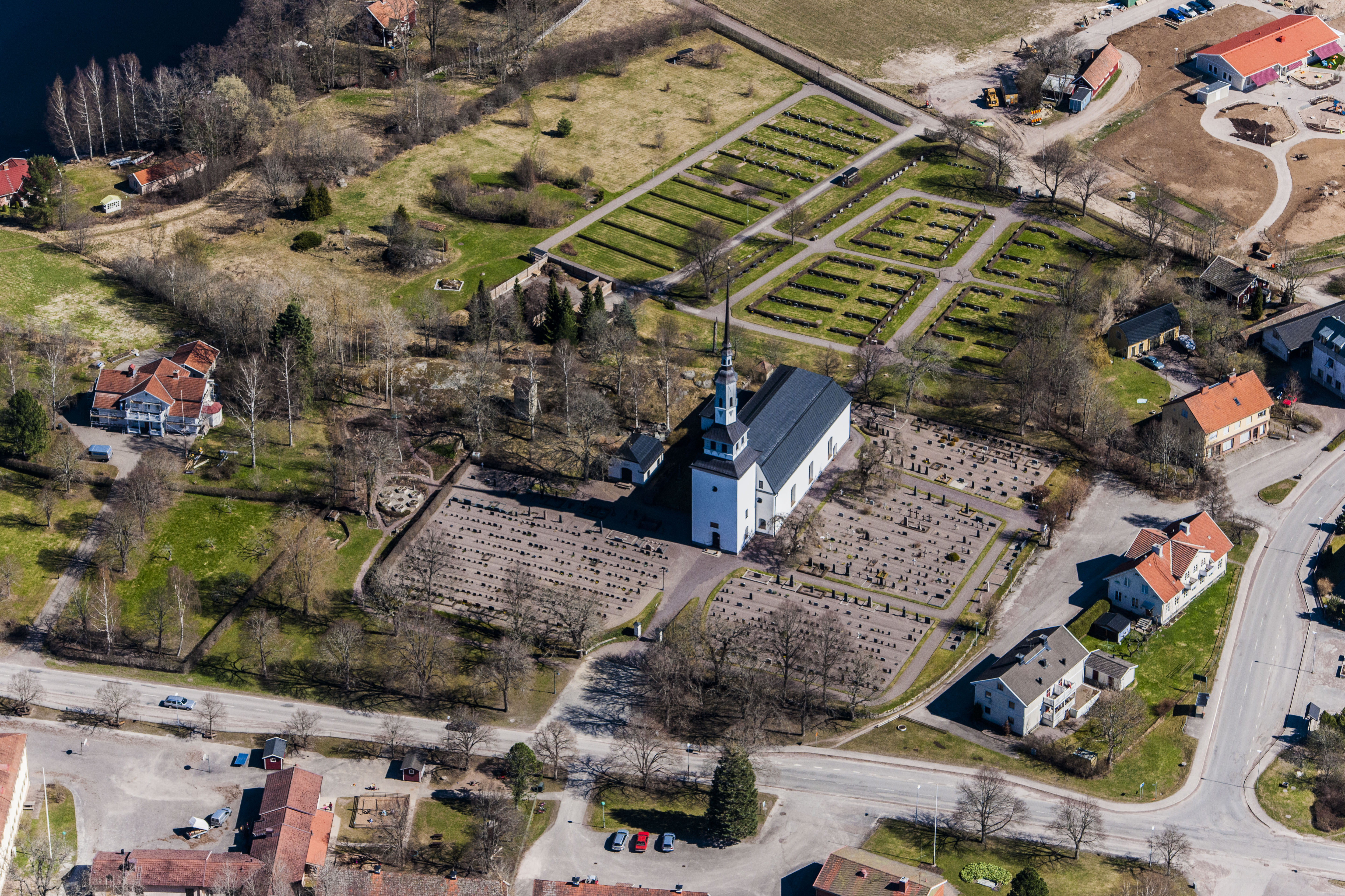 Horns ka